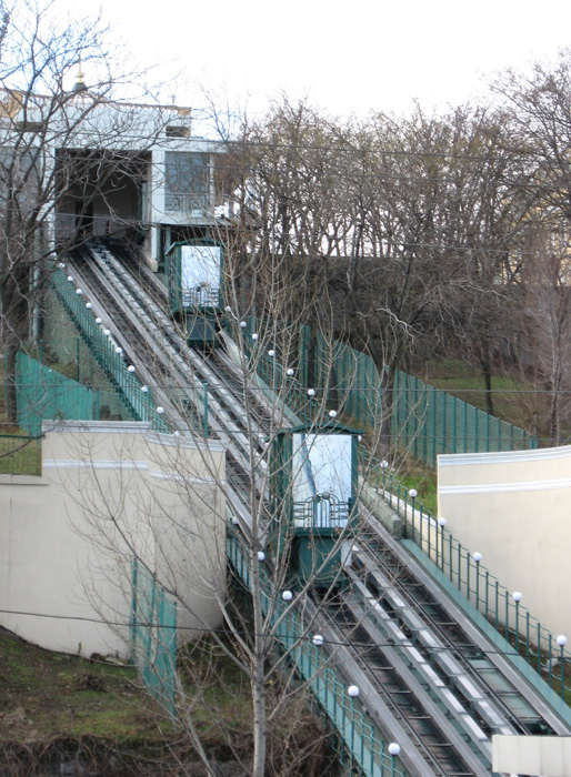 Одесский фуникулер